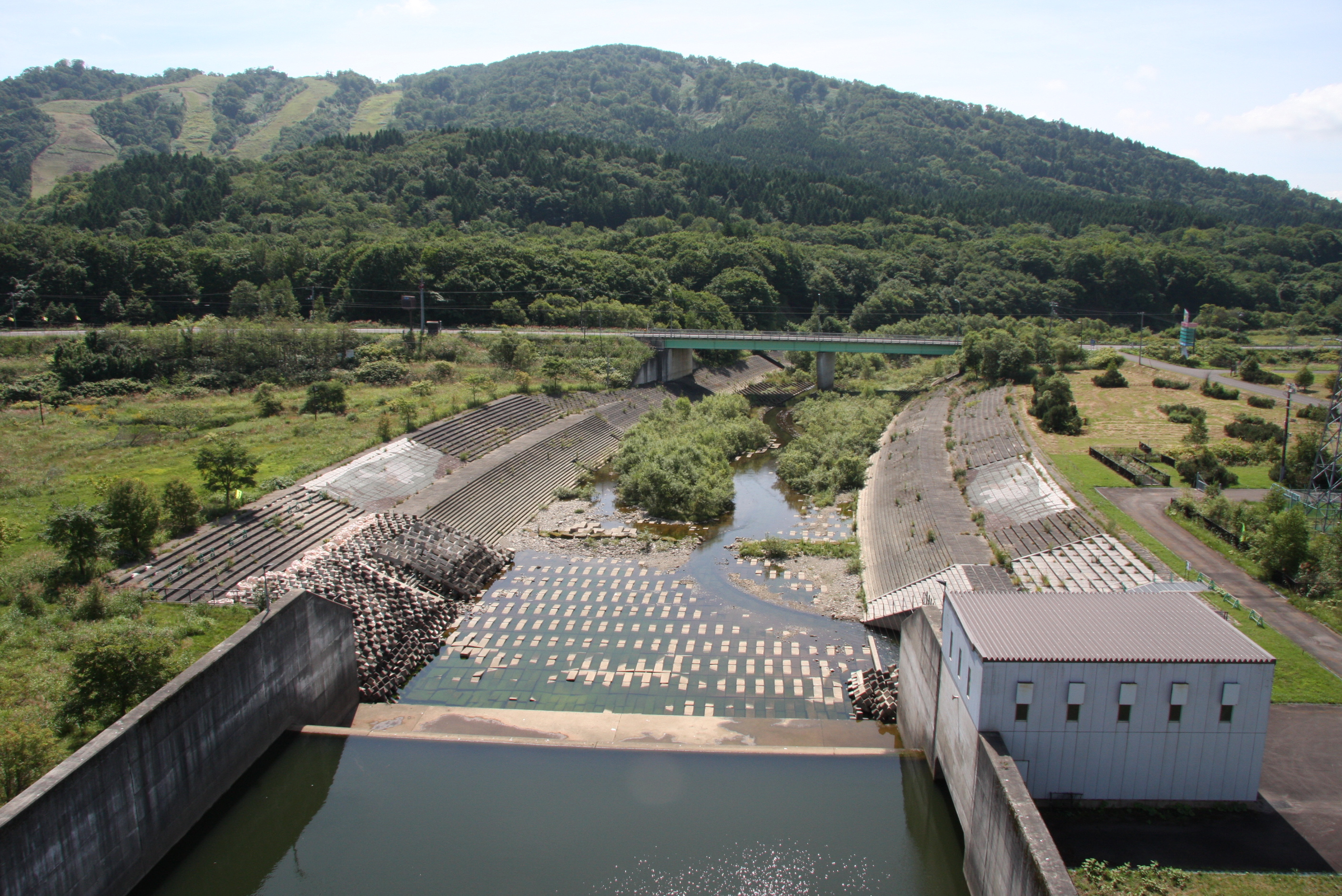 美利河ダムより俯瞰する後志利別川